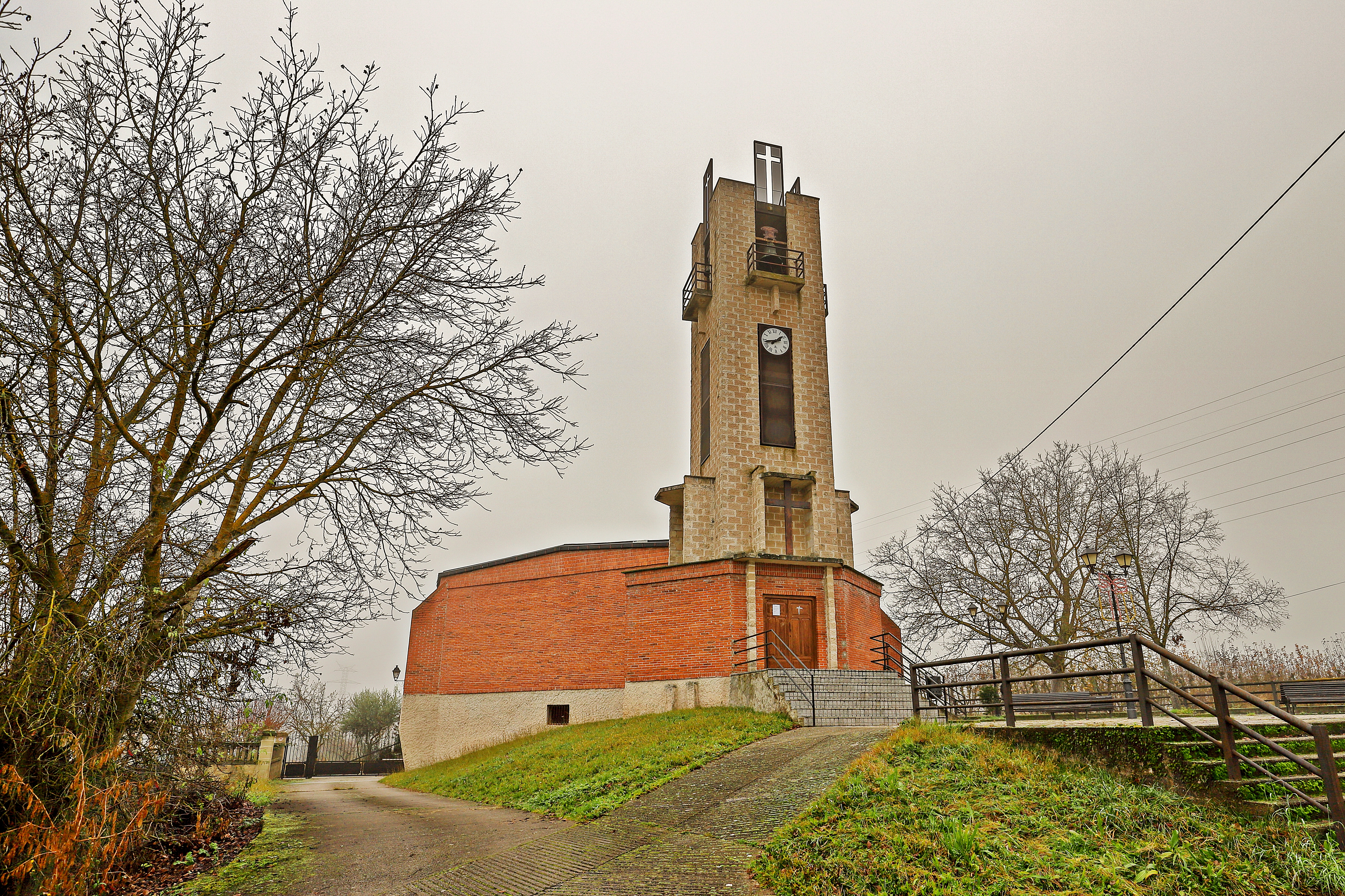 La Martina es una localidad del municipio de Ponferrada, en la comarca de El bierzo, provincia de León.